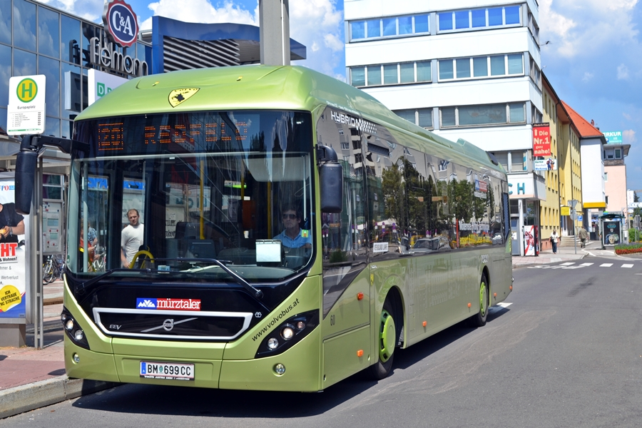 Volvo 7900 Hybrid auf der Linie 20 der MVG am Kapfenberger Europaplatz.